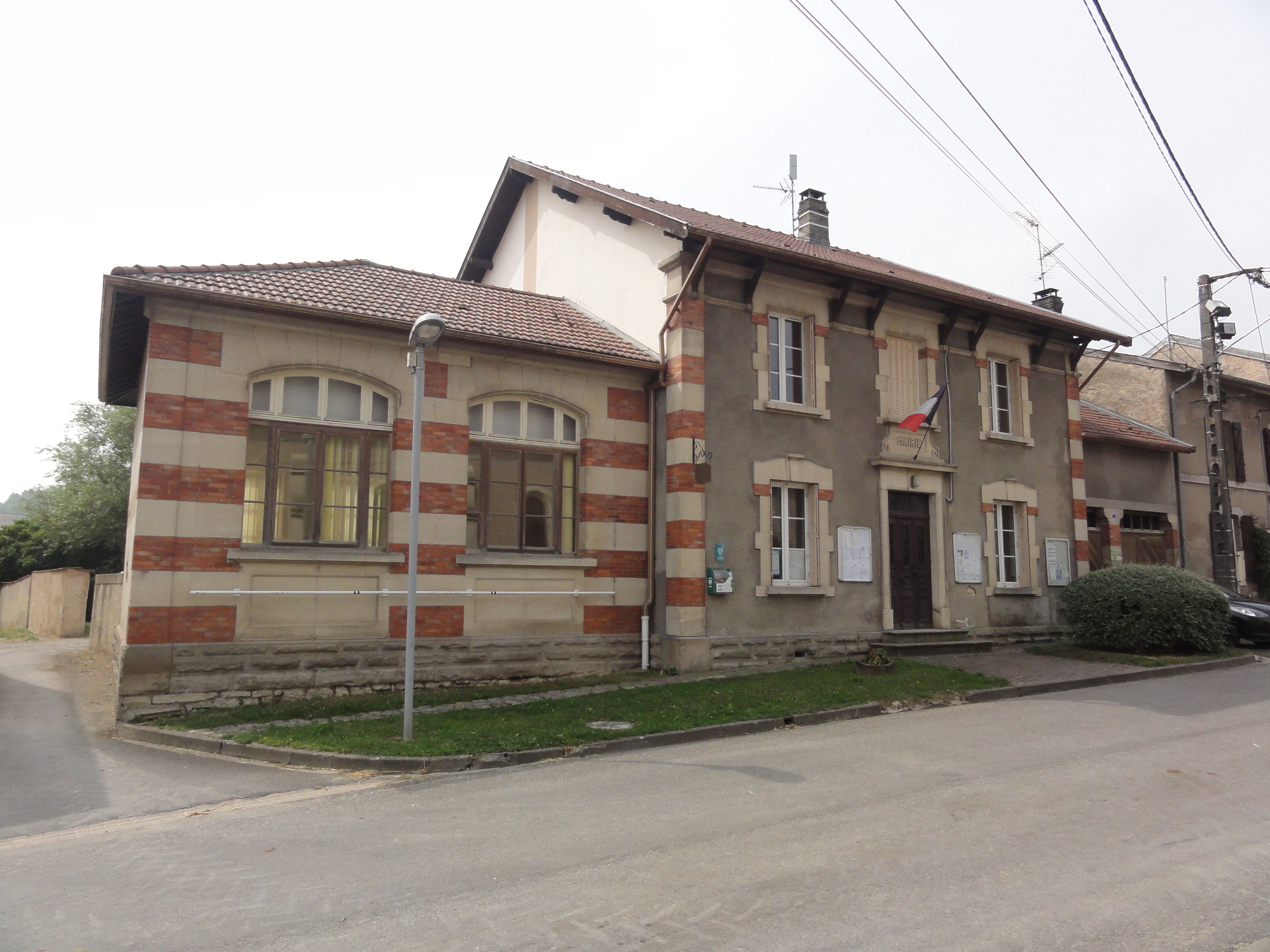 Ronvaux (Meuse) mairie-école